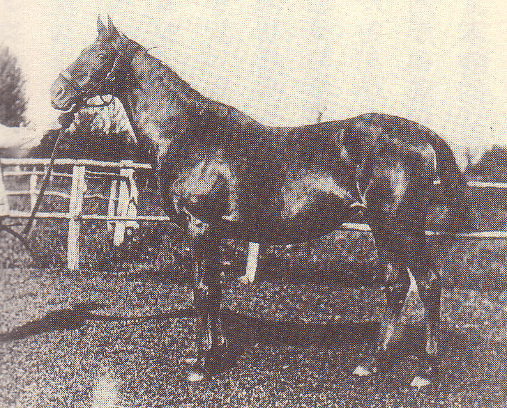 ビューチフルドリーマー（Beautiful Dreamer）はイギリス産の繁殖牝馬。